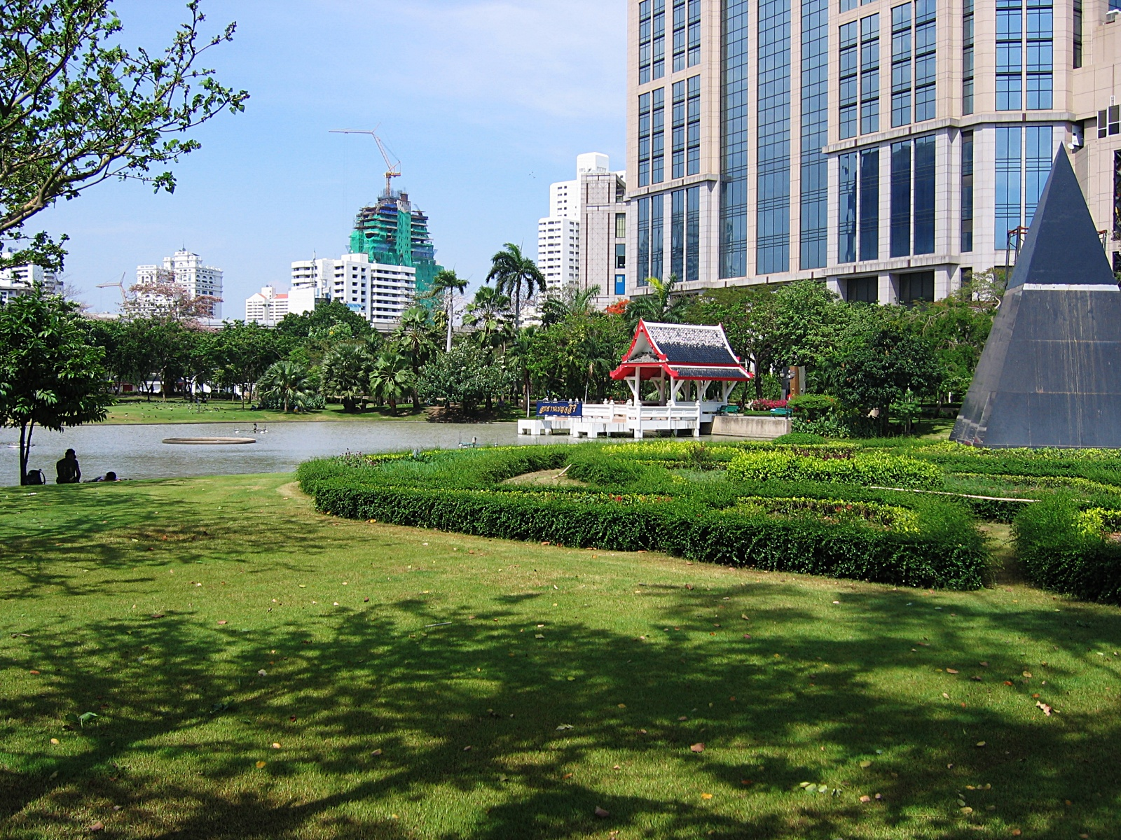 Benjasiri Park, Bangkok, Thailand